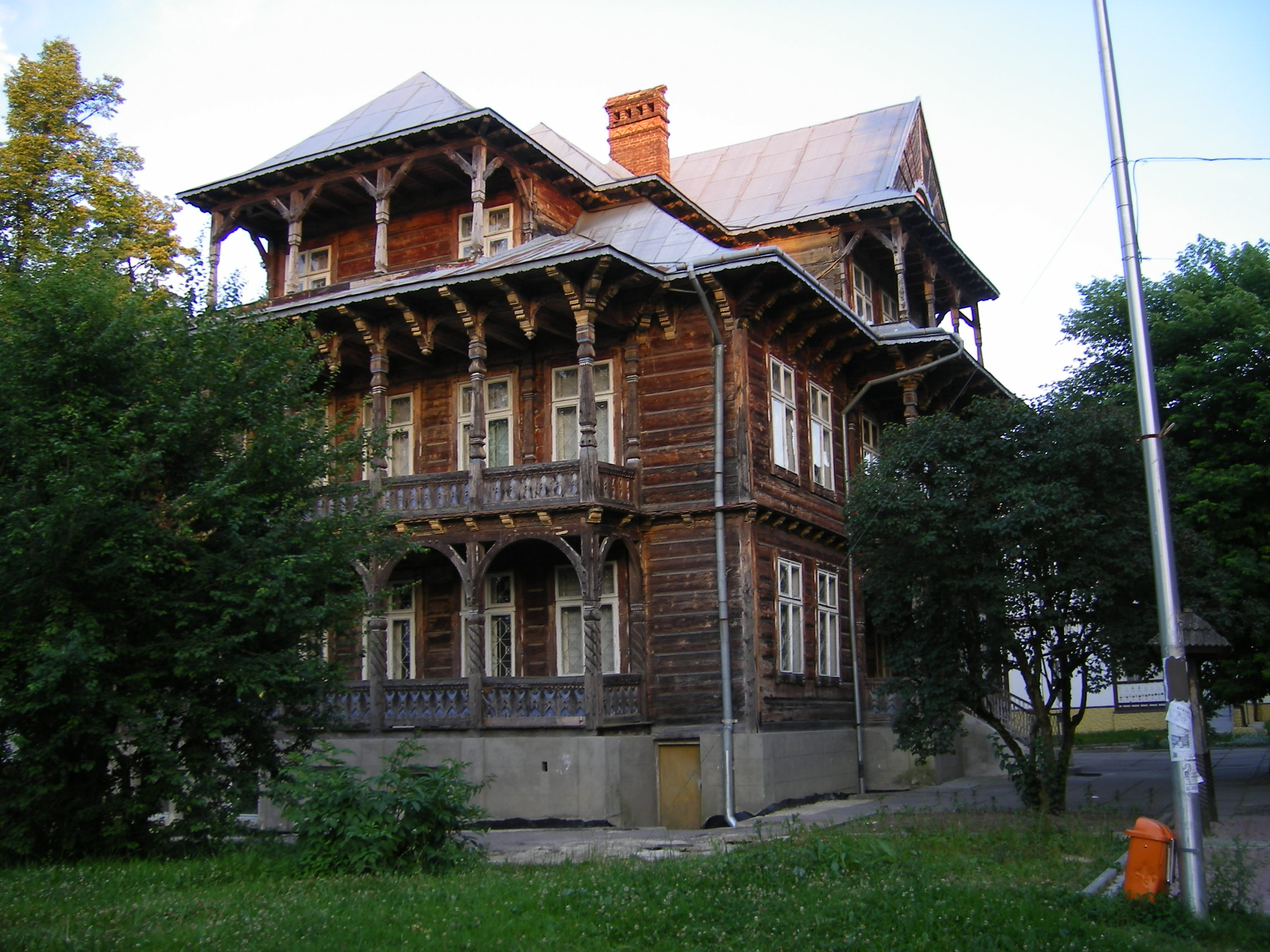 Truskavets